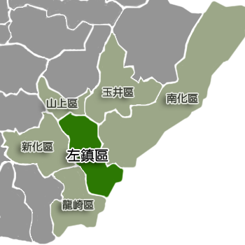 中文（台灣）: 臺南市左鎮區相對位置。